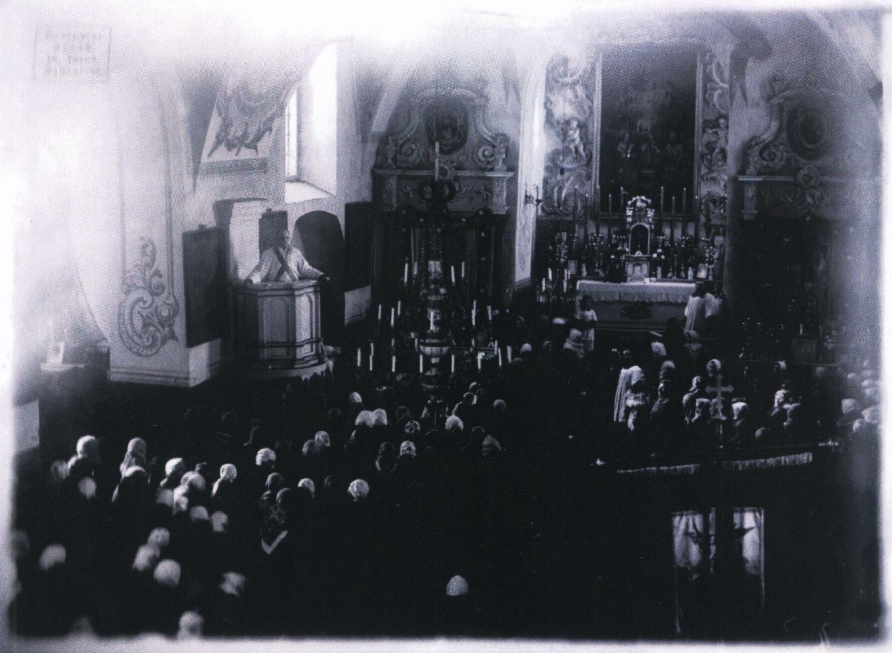 Wincenty Godlewski odprawia mszę św.